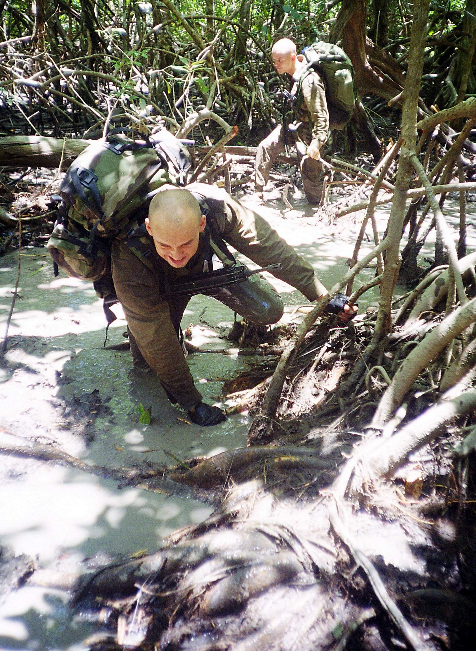 Progression en forêt au 3e régiment étranger d'infanterie à Kourou en Guyane (France)